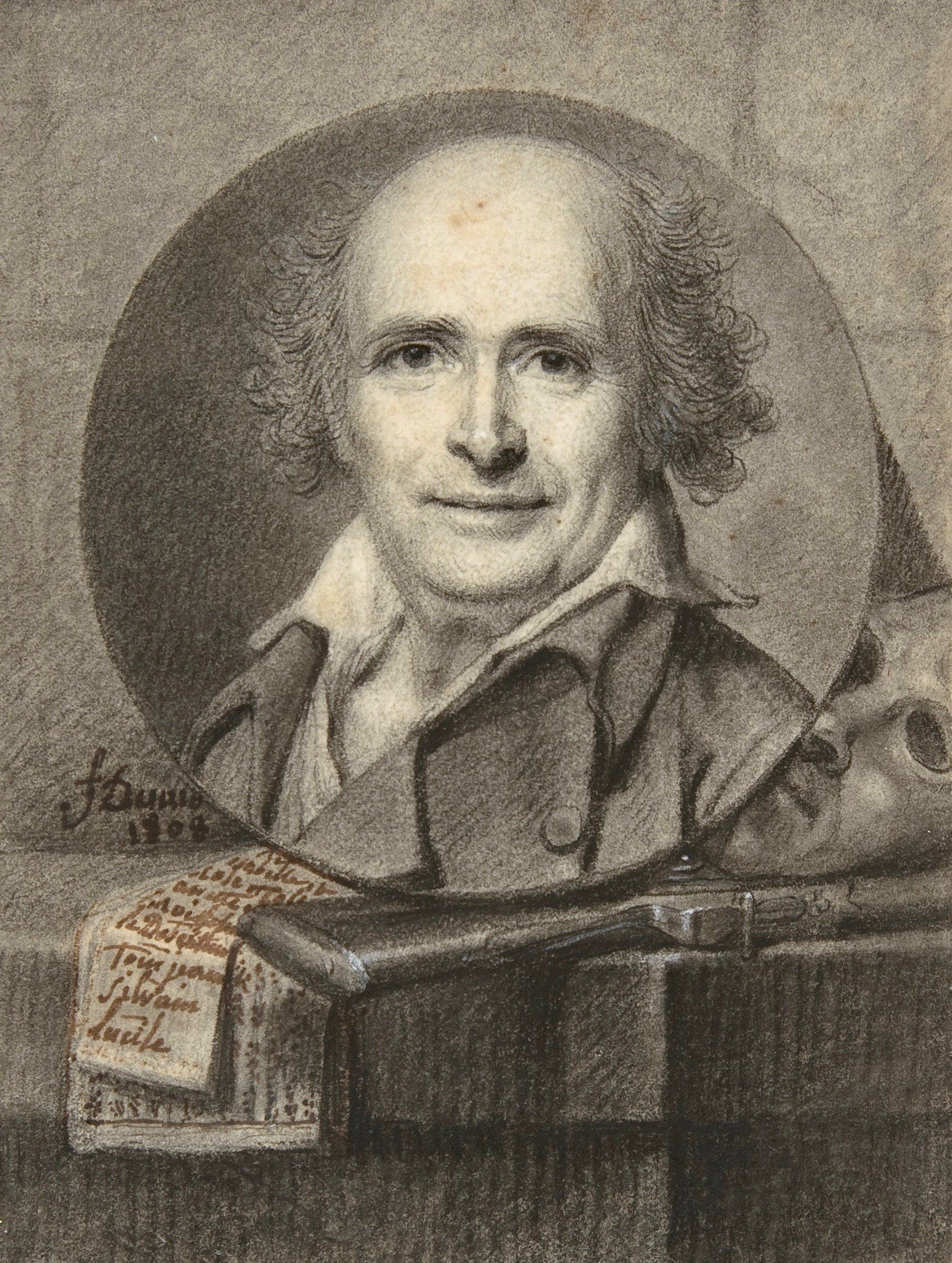 François Dumont (1751–1831): Der Komponist André-Ernest-Modeste Grétry (1741–1813), 1808. Kreide gehöht mit Weiß. 19,4 x 15,9 cm. Metropolitan Museum of Art, Inv.-Nr.1972.227. Ausschnitt.